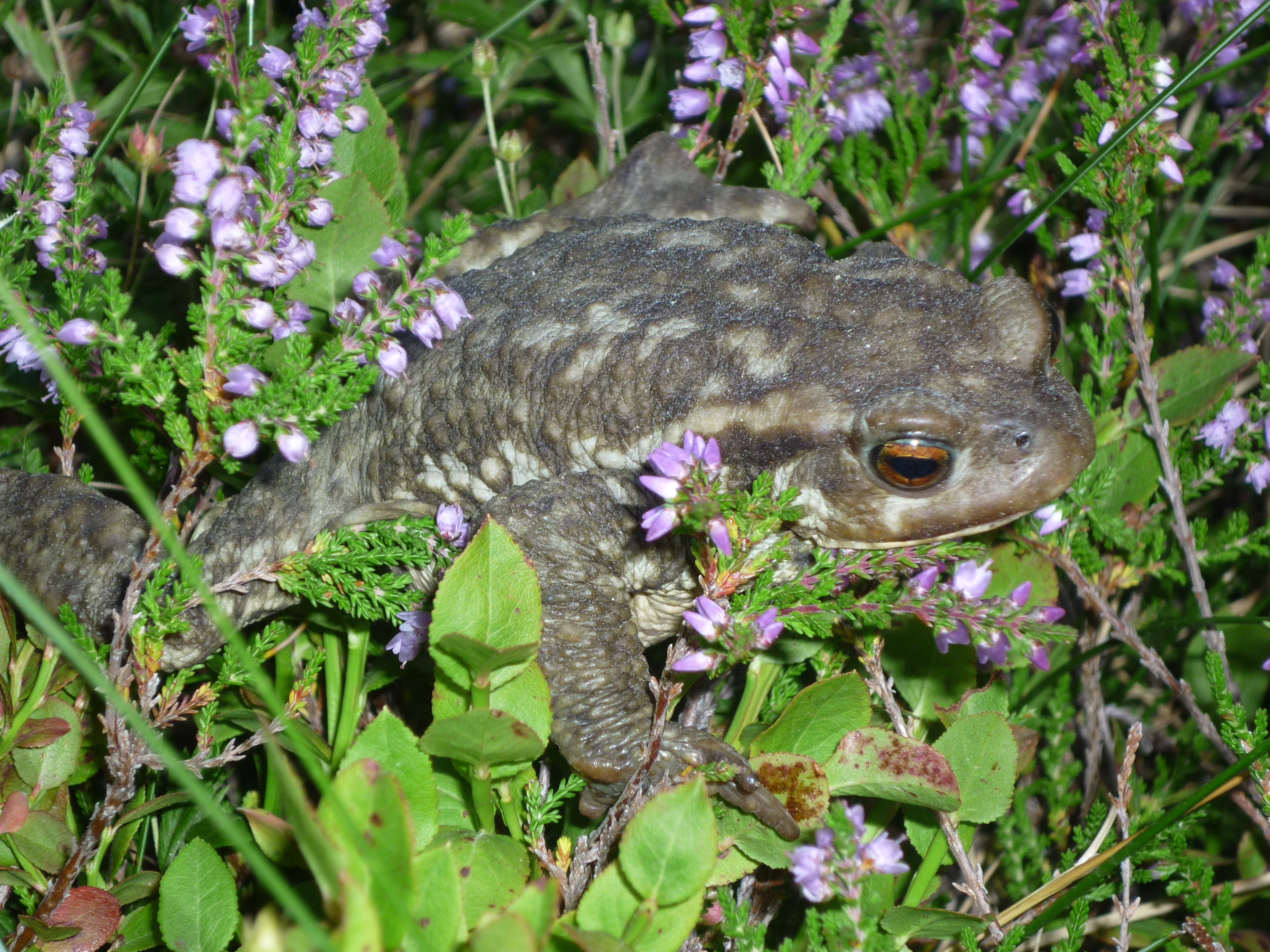 crapaud commun en milieu naturel, bord des étangs de Bassiès, commune d'Auzat, Ariège, Pyrénées